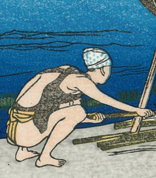 浮世絵にみられる腹掛け。背中で紐をクロスし、腰部は背面まで覆う形になっている。歌川国芳『東都三ツ又の図』より。